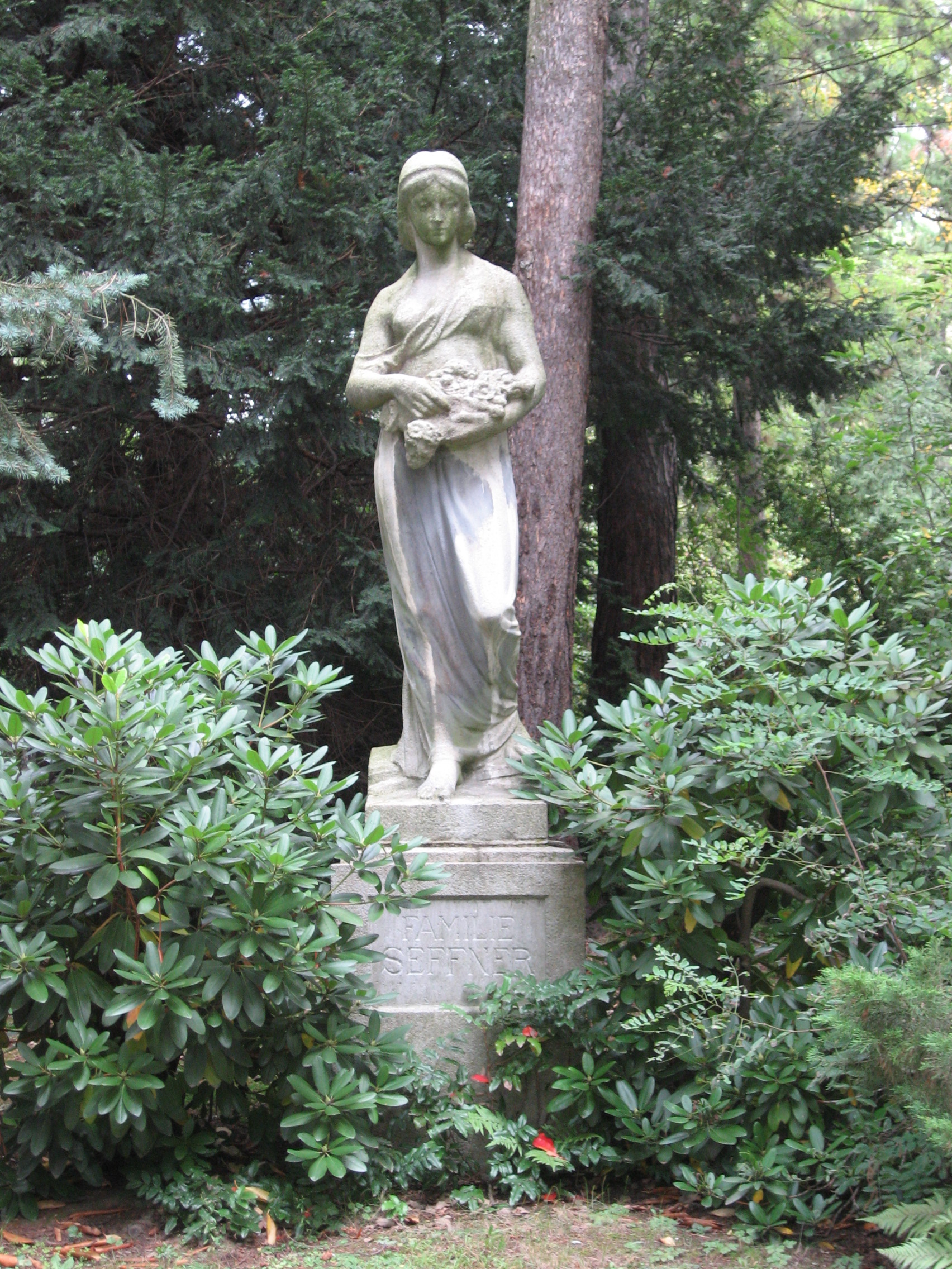 Grabdenkmal von und für Carl Seffner (19.6.1861–2.10.1932) auf dem Leipziger Südfriedhof (II. Rab. 164/67)